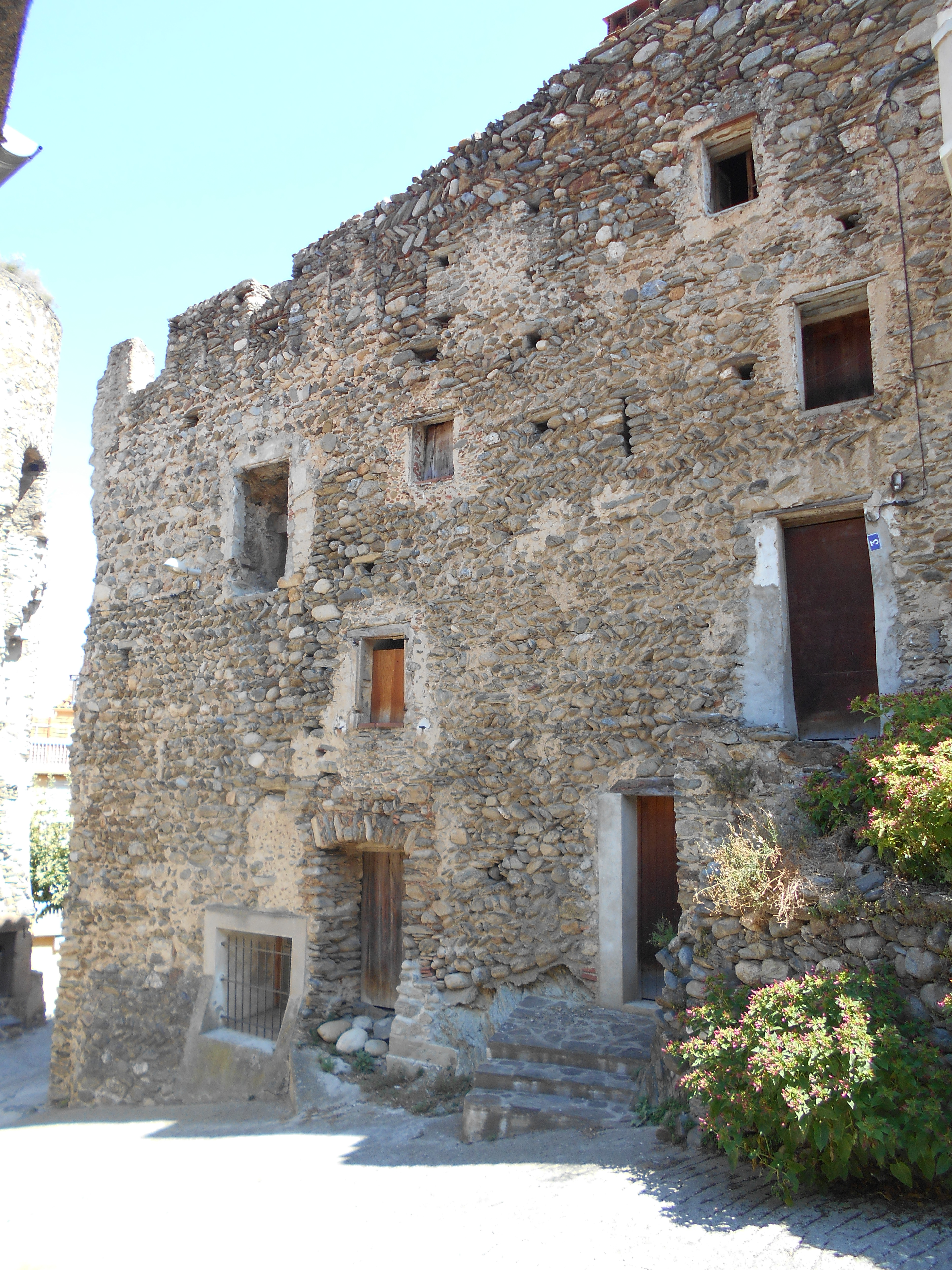 Muralles de Bulaternera